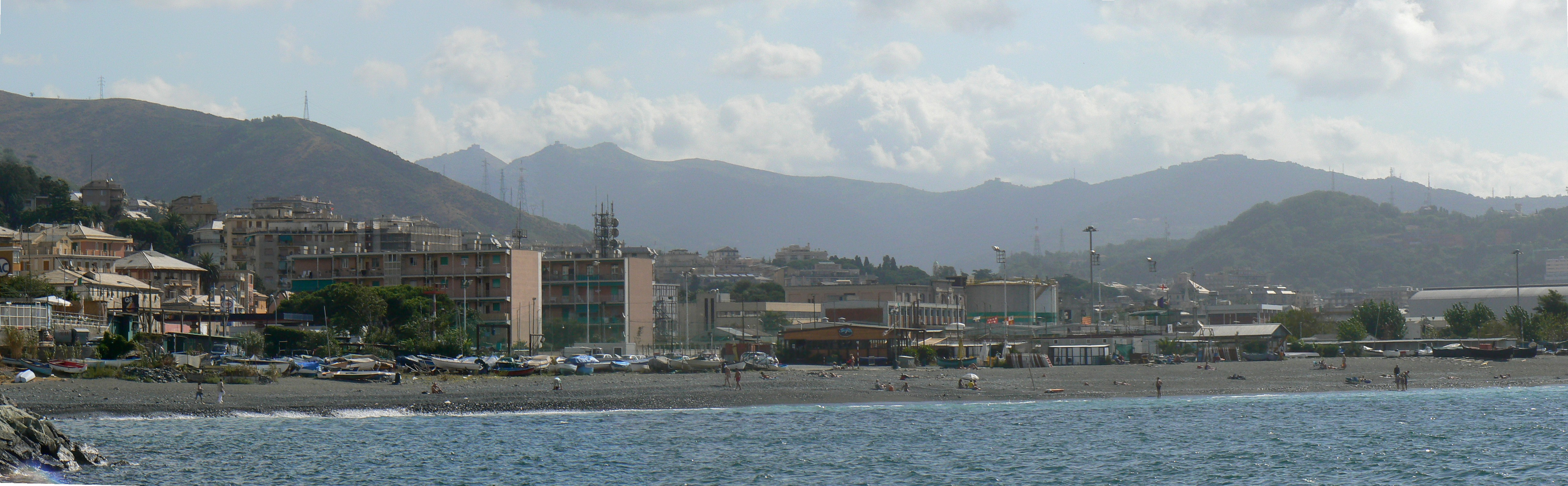 Panorama della spiaggia di Multedo (Genova). Realizzata con fotografie personali